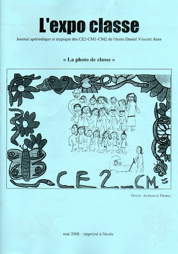 Première page d'un journal scolaire.